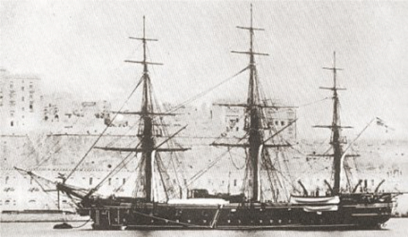 Die preußische Korvette SMS Vineta